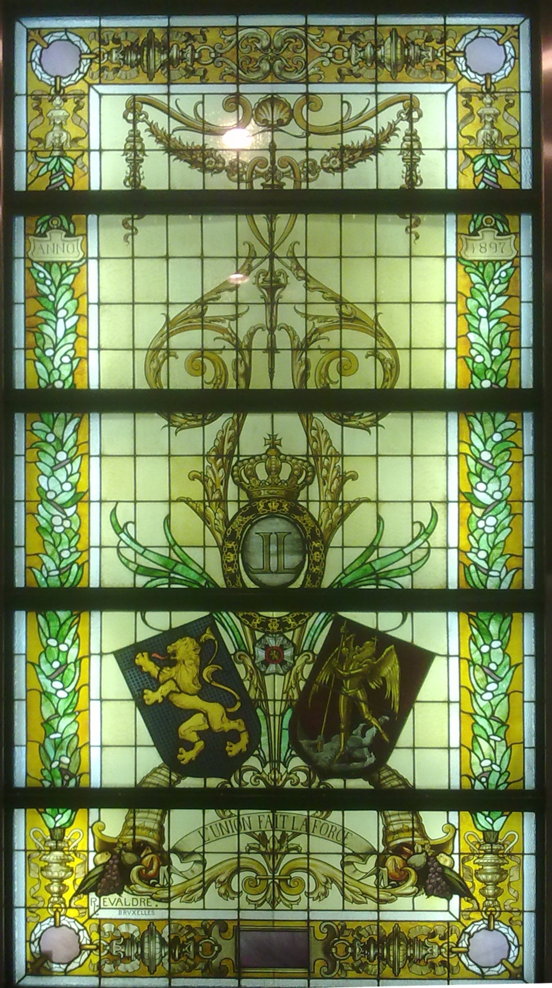 Vitrail avec le monogramme du Roi Léopold et l'écusson belge et de la Ville de Bruxelles. Réalisé par Raphael EVALDRE. photographié au niveau du quai de la Gare du Luxembourg à Bruxelles en 2014.